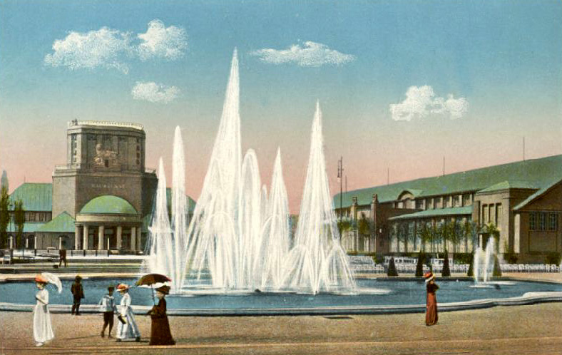 Internationale Baufach-Ausstellung 1913 Leipzig, Hallen für Raumkunst und Baustoffe